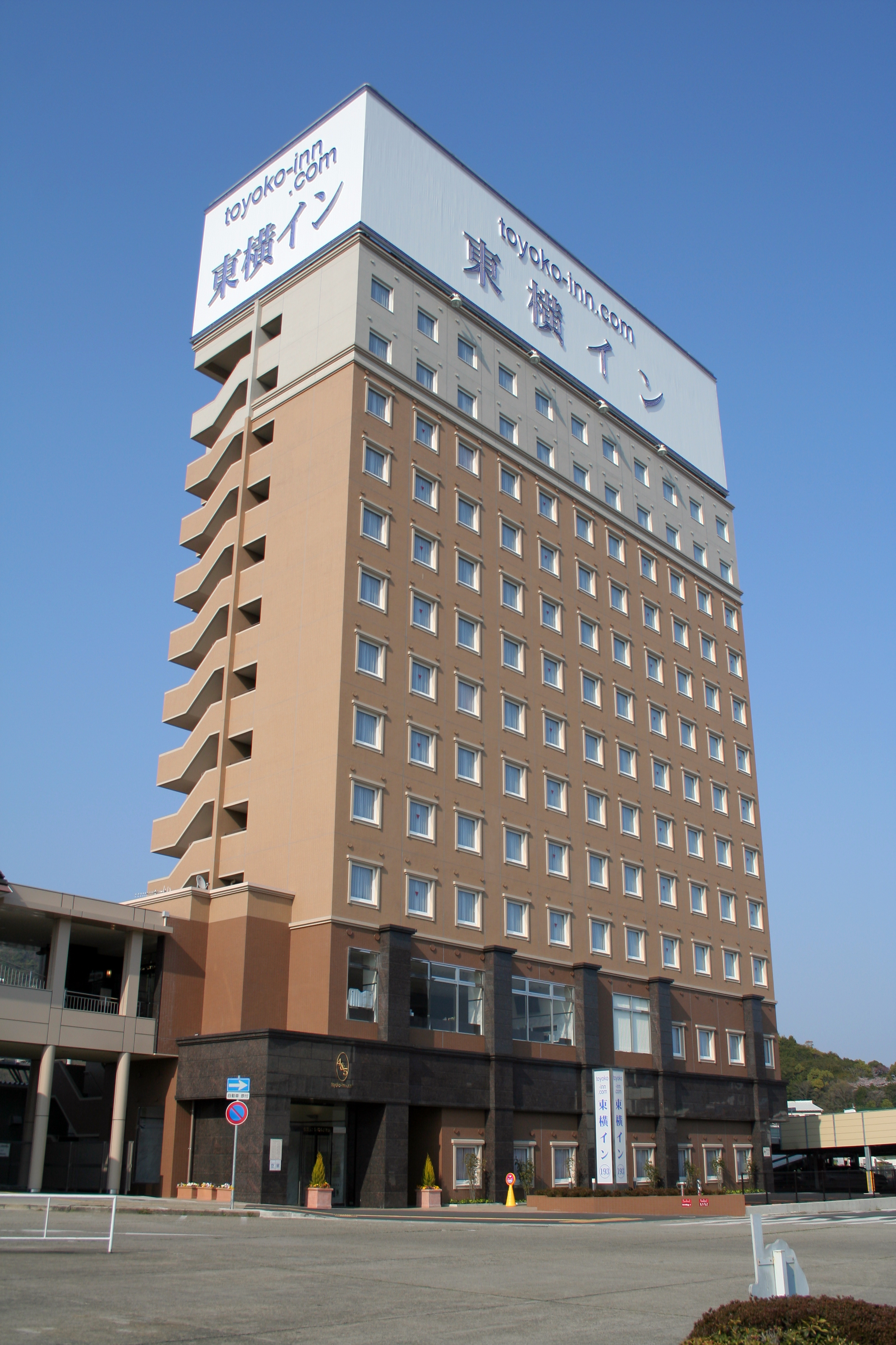 兵庫県南西部にある店舗など。 播州赤穂駅の横にある東横イン赤穂駅前店。